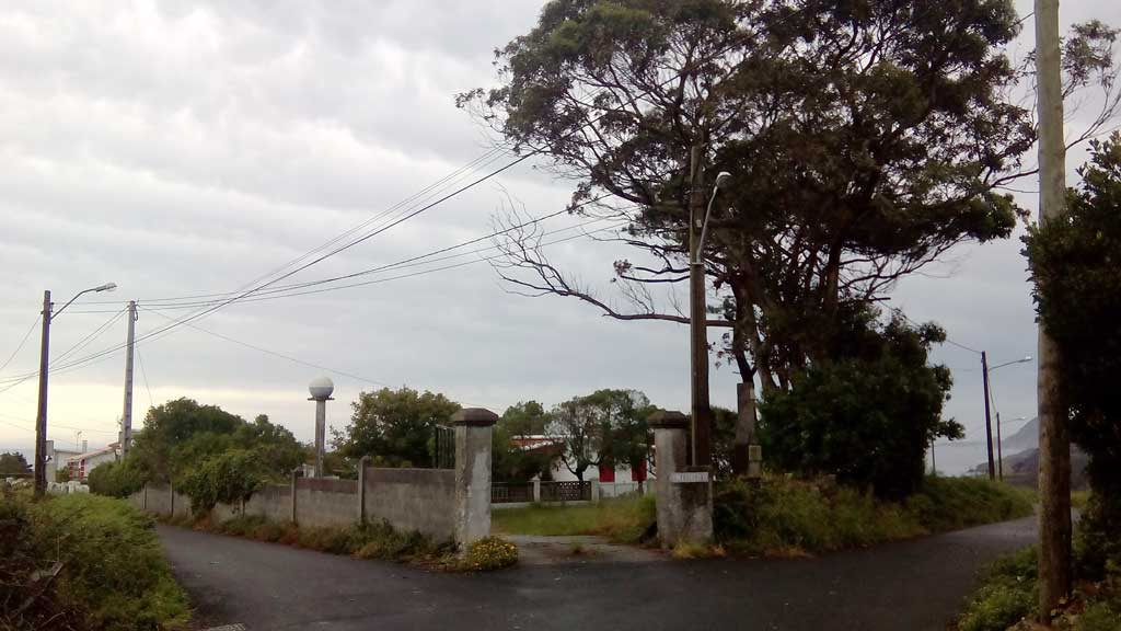 Vista da Aldea, Covas.